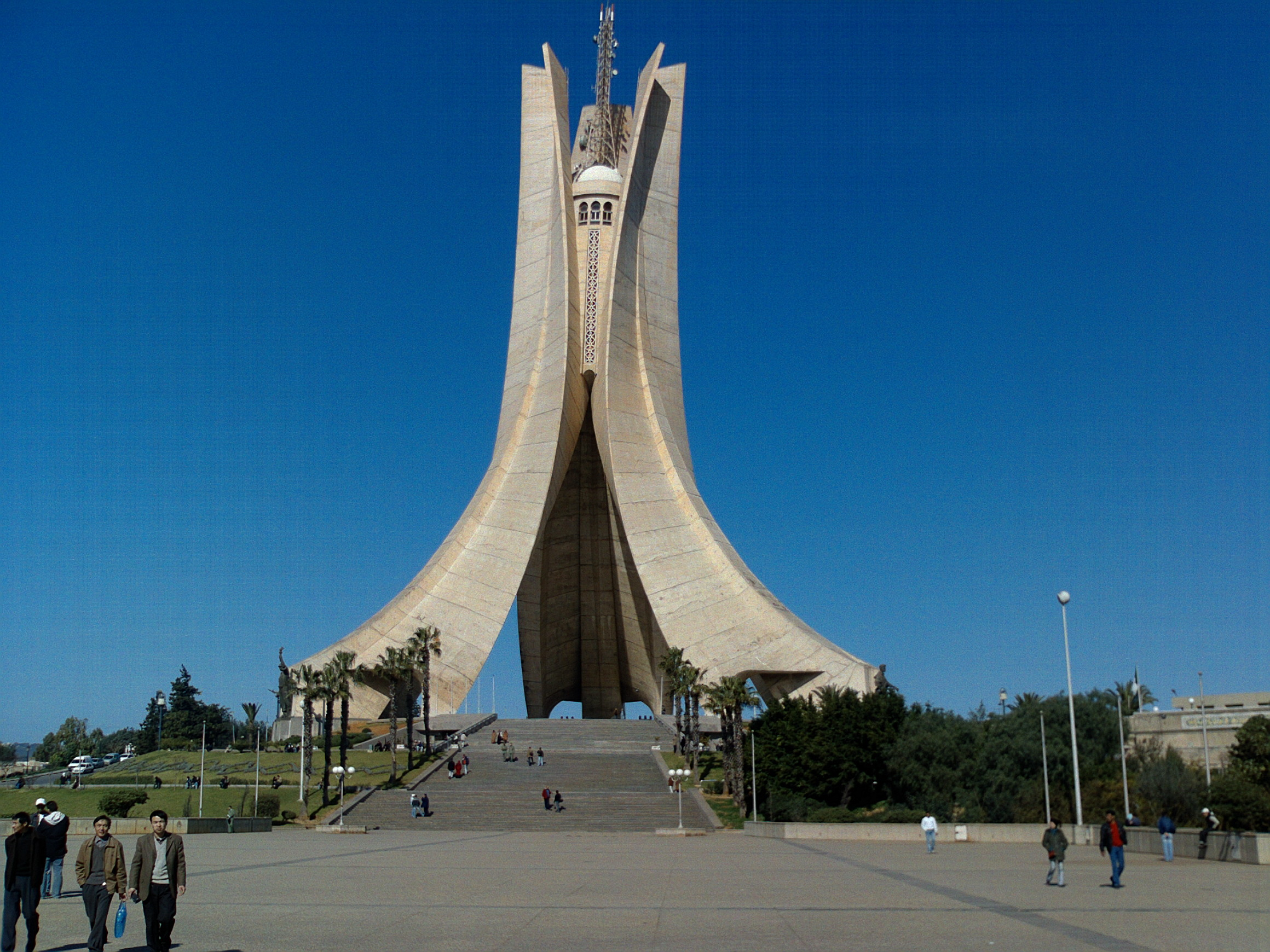 Monument aux martyrs de la Guerre d'Algérie. Auteur : Malik Mehni